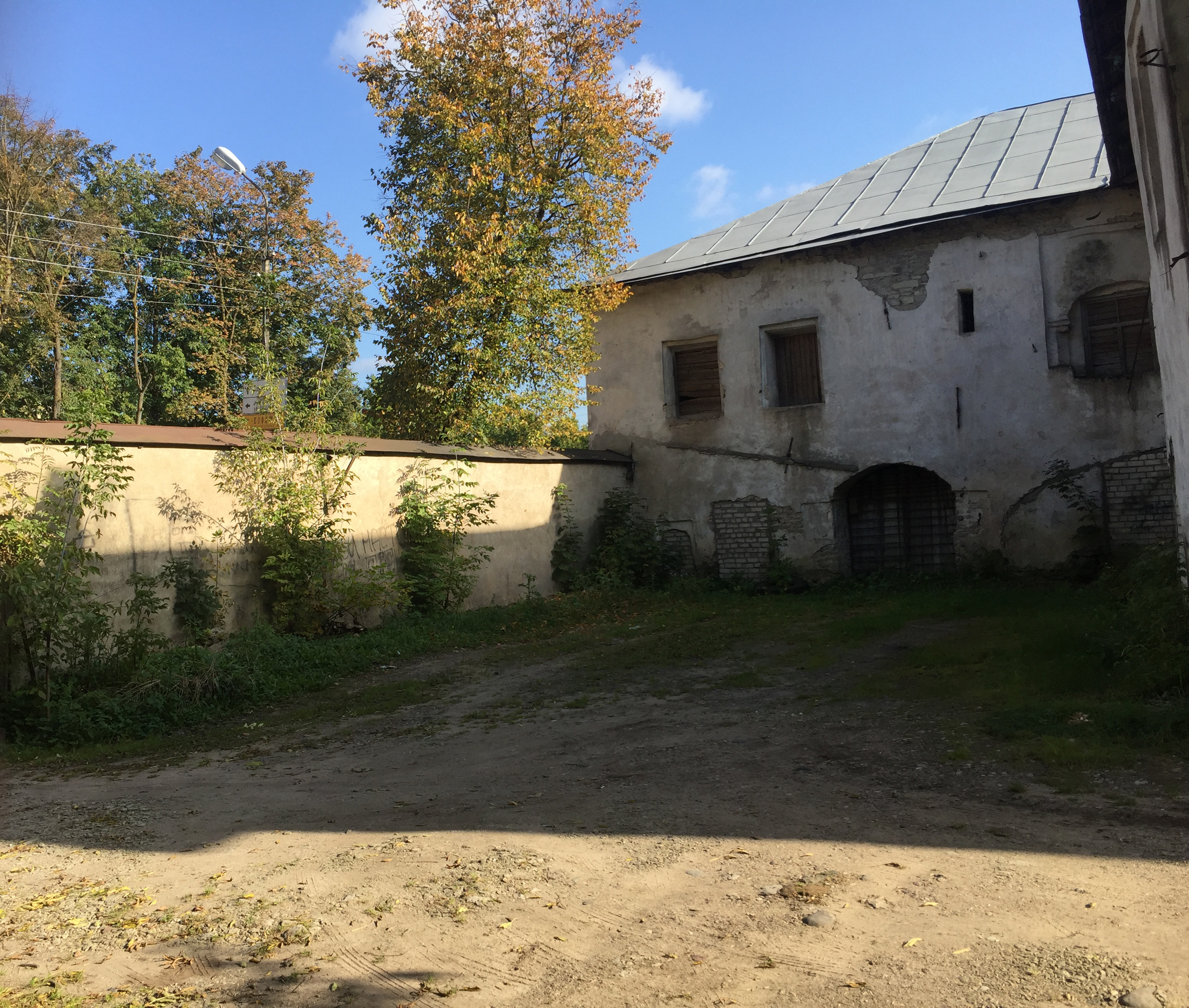 Палаты Трубинских (дом Трубинских со служебными постройками): Запсковье, улица Леона Поземского 20 и 22, территория фабрики "Шпагат", Псков, Псковская область